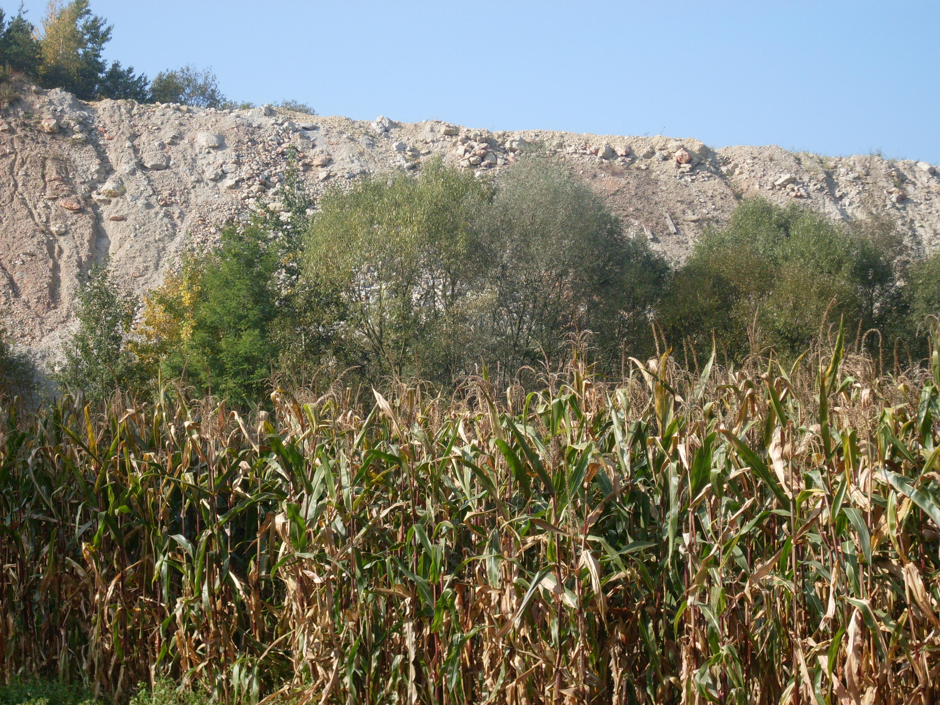 Zwałowisko.Kamieniołomu Zalas od strony przysiółka Tataruchy